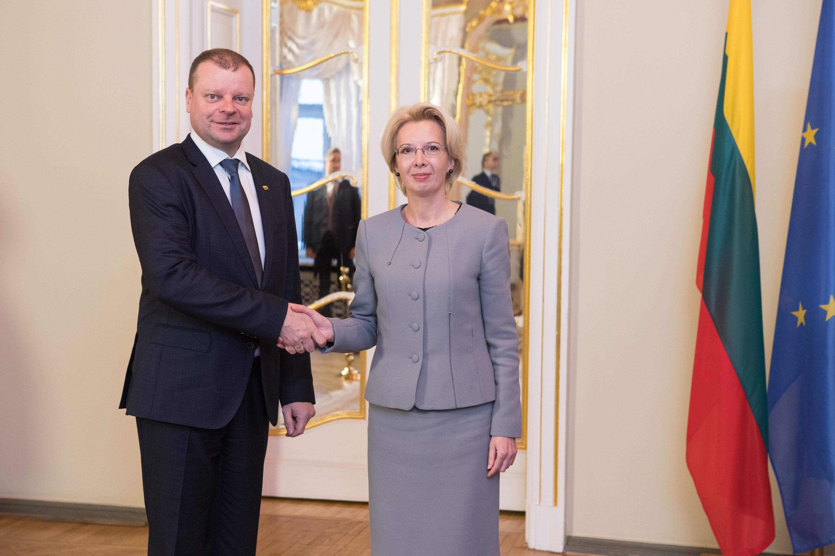 2017.gada 12.janvāris. Saeimas priekšsēdētāja Ināra Mūrniece tiekas ar Lietuvas premjerministru Sauļu Skverneli (Saulius Skvernelis). Foto: Ernests Dinka, Saeimas Administrācija Izmantošanas noteikumi: saeima.lv/lv/autortiesibas